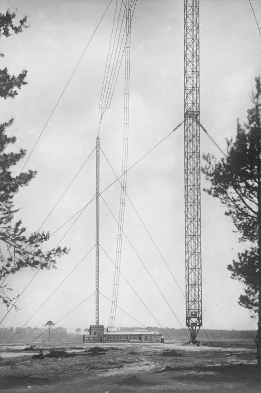 Von hier aus gehen die Wellen um die Erde! Die riesige Mast- und Antennenanlage des Weltrundfunk-Senders Königswusterhausen, welcher auf der ganzen Erde gehört werden kann.